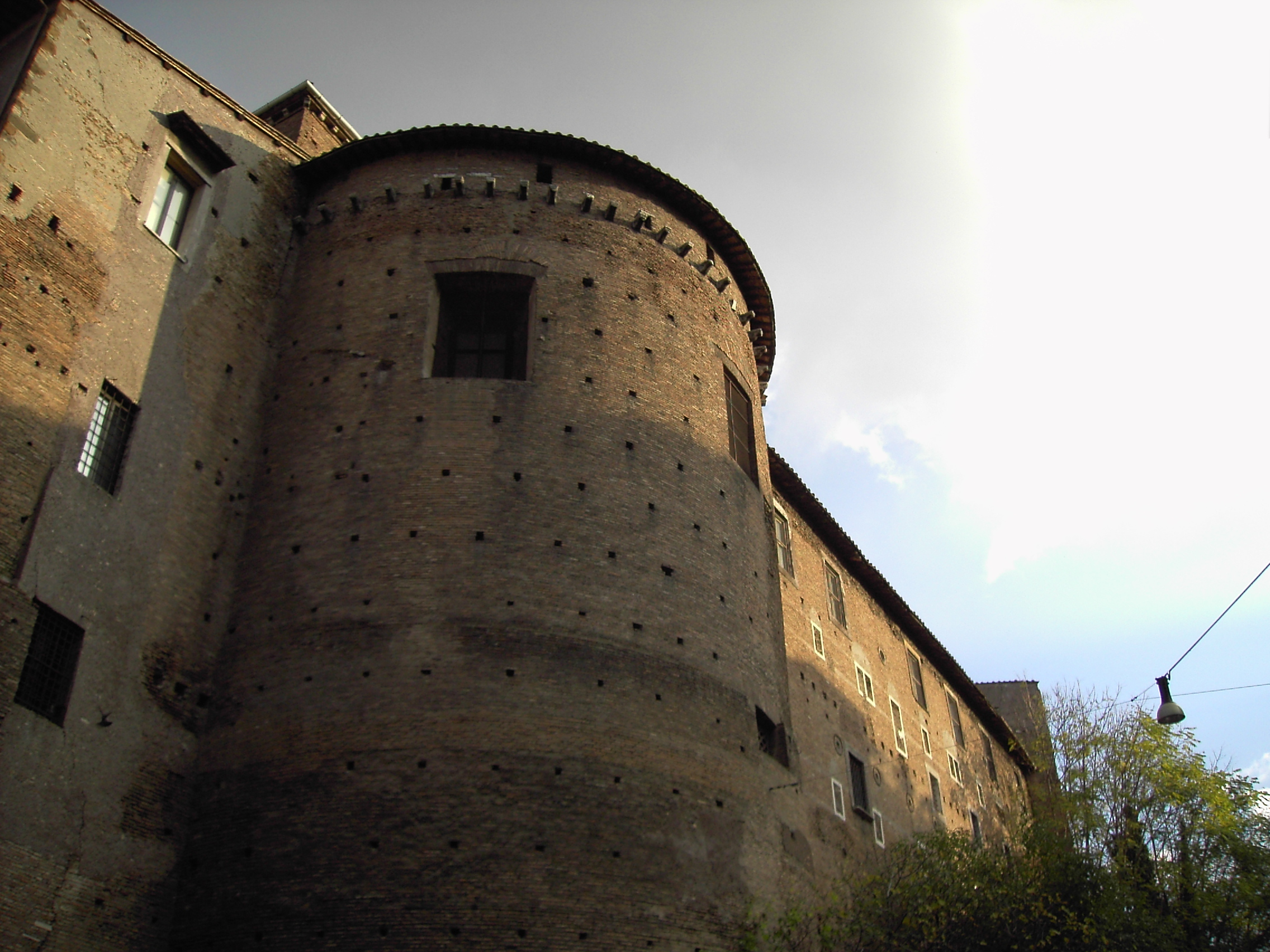 Roma, Santi Quattro Coronati: abside e palazzo cardinalizio by Lalupa